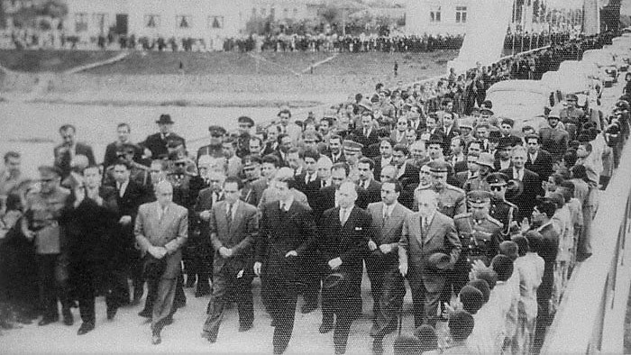 Mohammad Reza Shah Pahlavi visits Amol